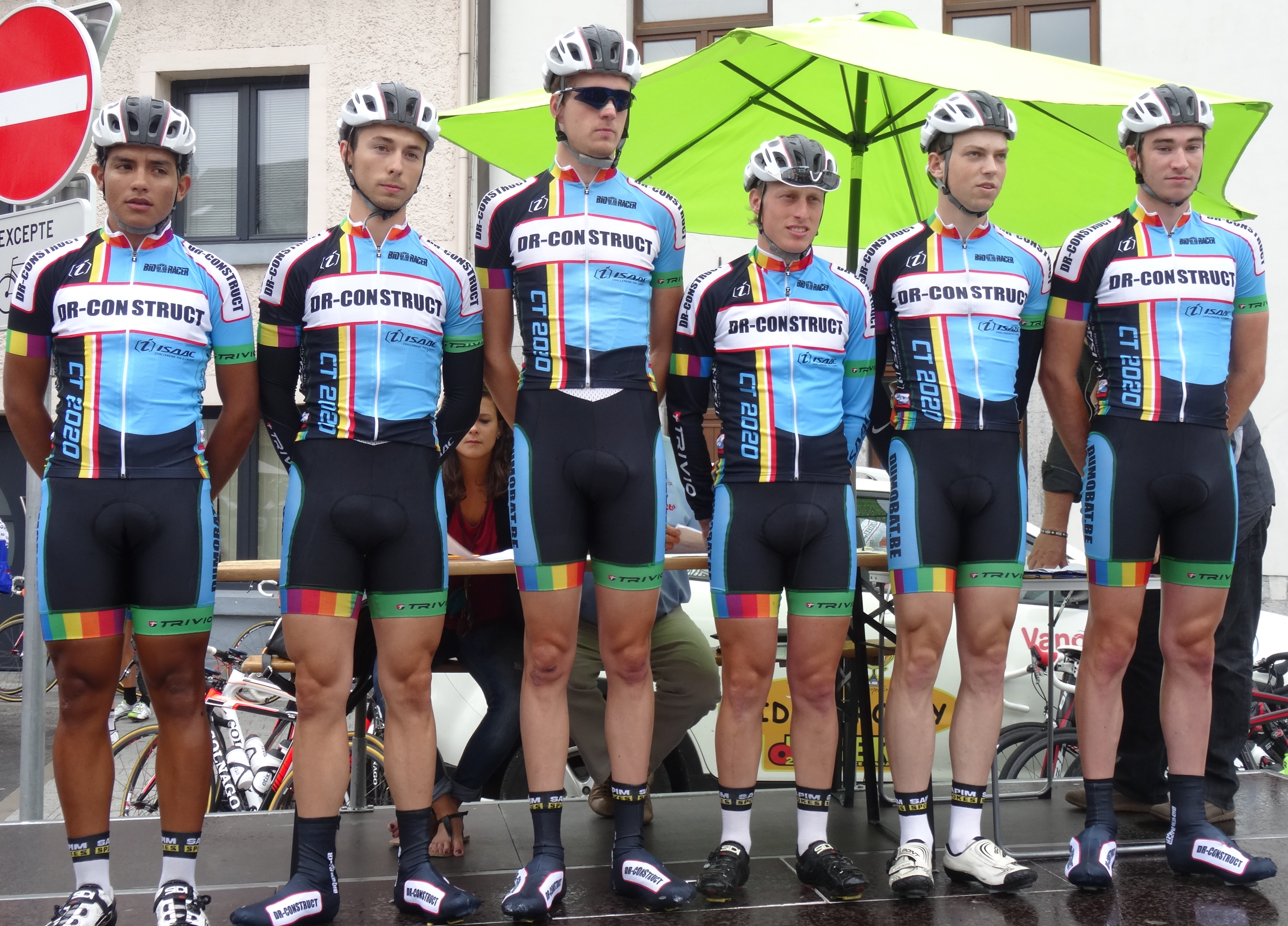 Reportage photographique réalisé le mercredi 6 août à l'occasion du départ de la première étape du Tour de la province de Namur 2014 à Jambes (Namur), Belgique.